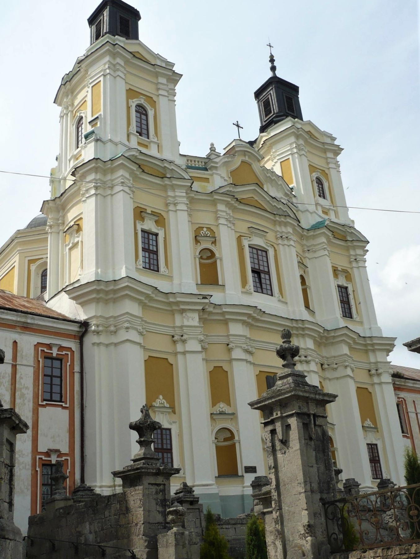 Kościół jezuitów w Krzemieńcu